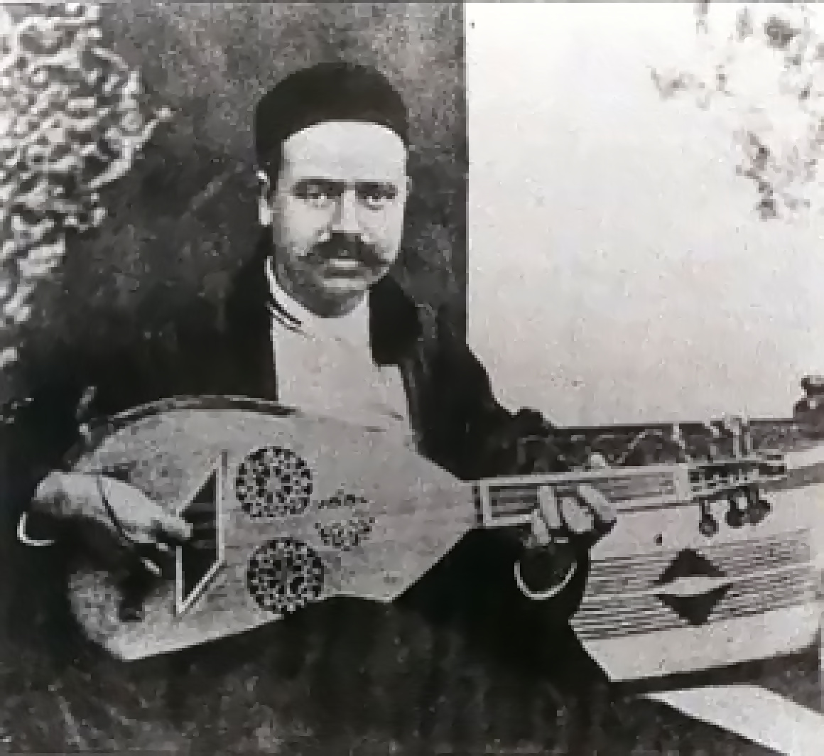 Maïs Tarnane et son oud